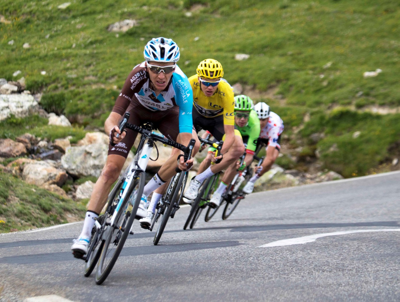 19-7_2 bardet froome uran barguil